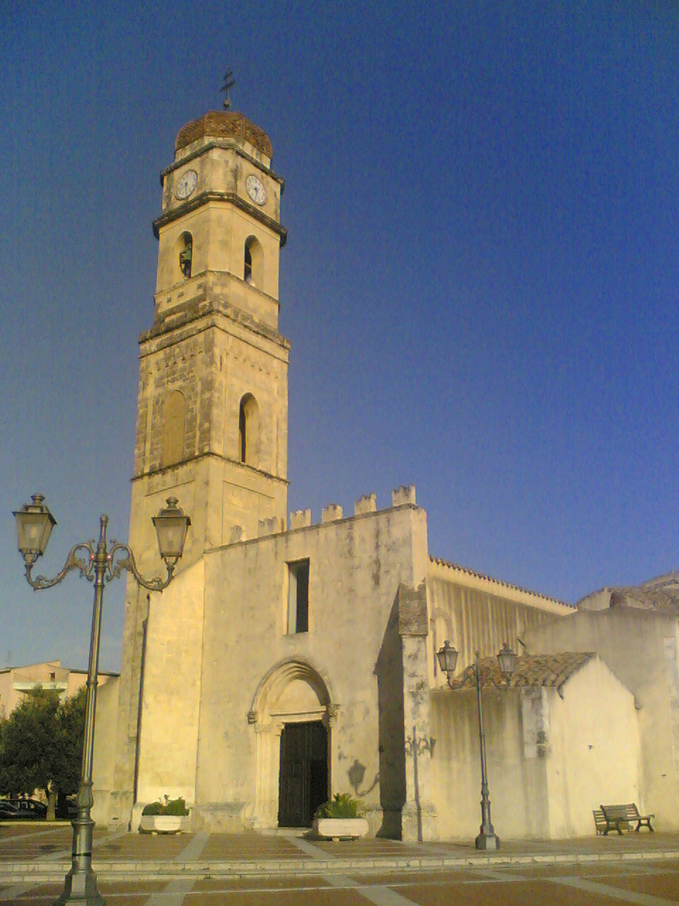 Chiesa di San Pietro ad Assemini (provincia di Cagliari). Autore: Pietro Mudu